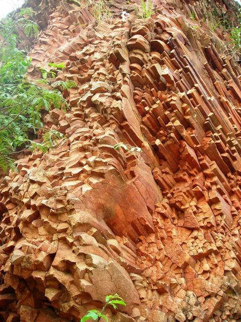 Cerro Koi, Aregua, Paraguay